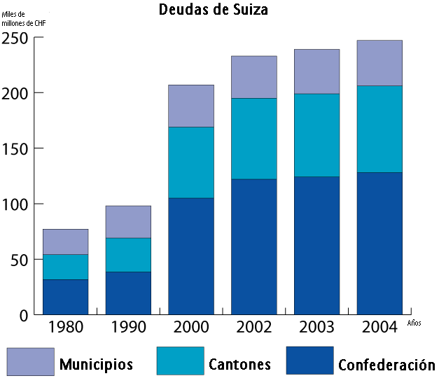 Debts of Switzerland